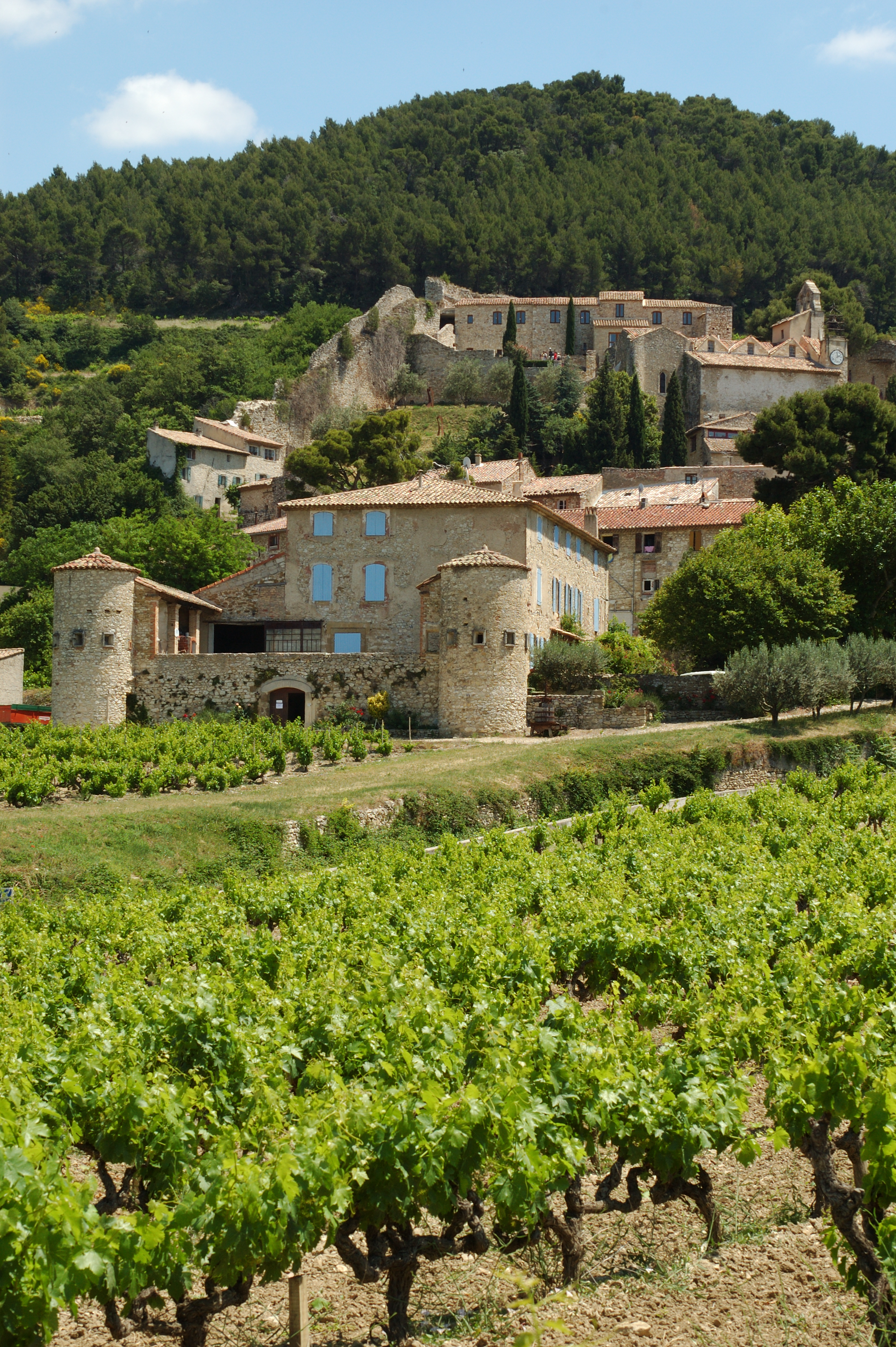 Les Tourelles, dans un écrin de verdure, au pied des Dentelles de Montmirail.